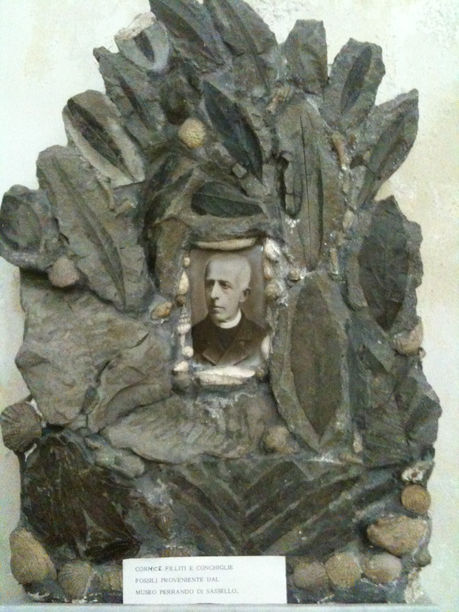 Chiesa di Stella Santa Giustina SV (Italy), cornice in fossili della foto di Don Deogratias Perrando